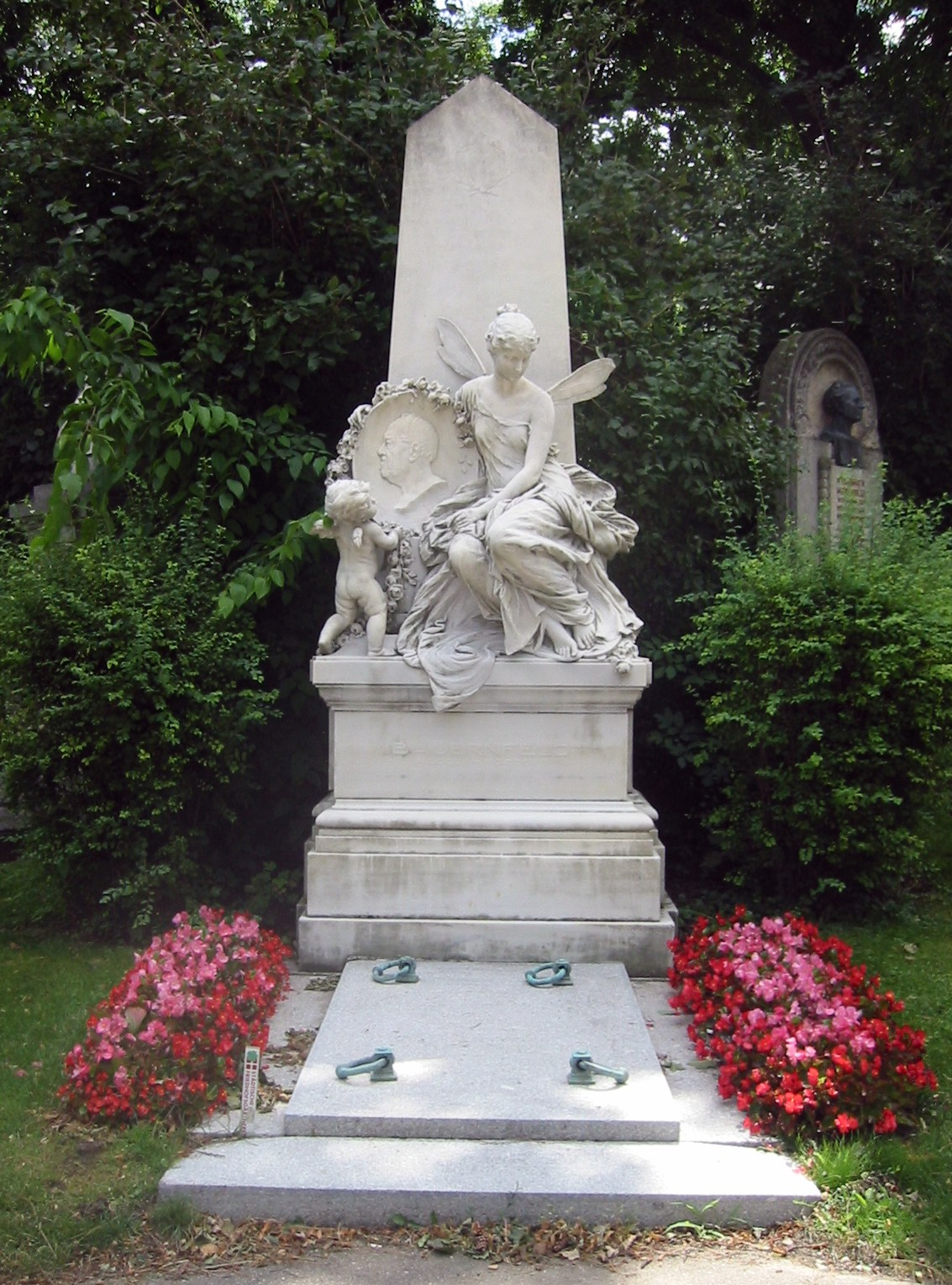 Grab von Eduard von Bauernfeld am Wiener Zentralfriedhof. Bildhauer Franz Seifert